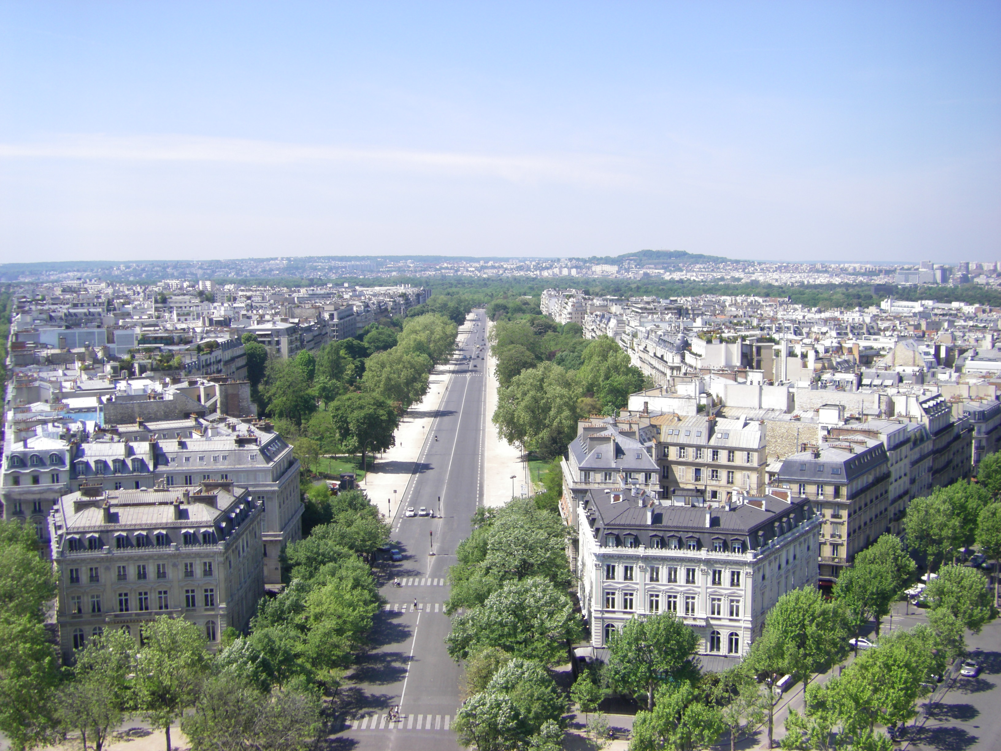 Avenue Foch, vom Arc de Triomphe fotografiert